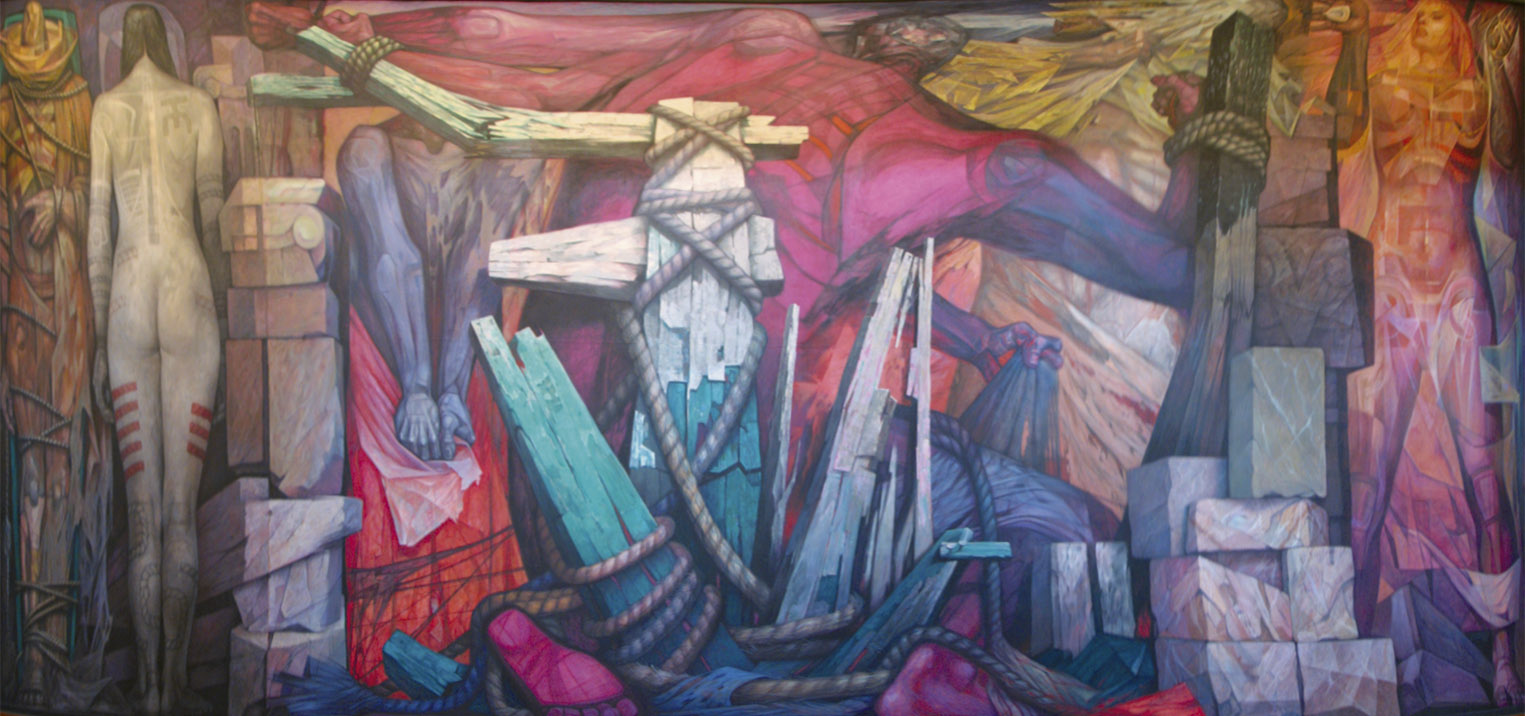 Pintura creada por Jorge González Camarena de 1957 a 1963 y resguardada en el Palacio de Bellas Artes de la ciudad de México